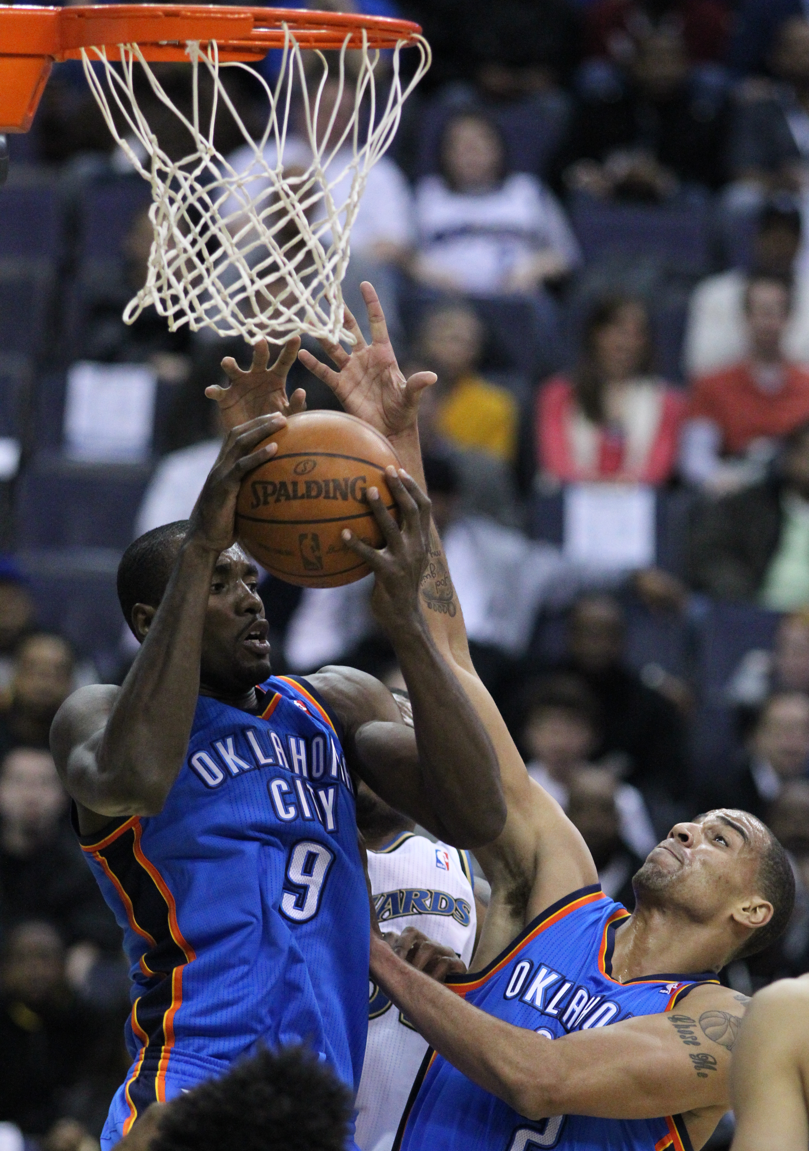 Wizards v/s Thunder 03/14/11